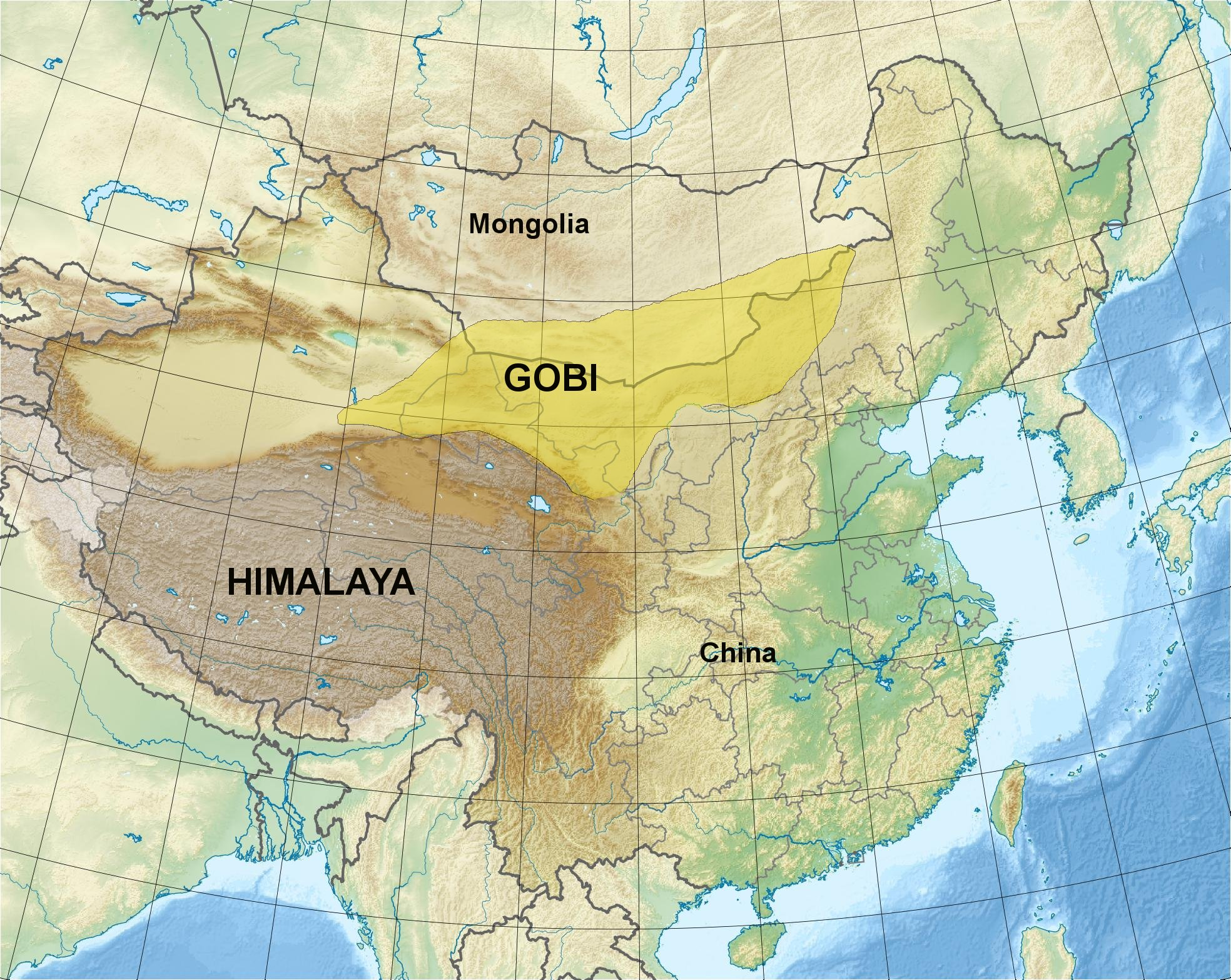 Desert du Gobi - carte Unknown